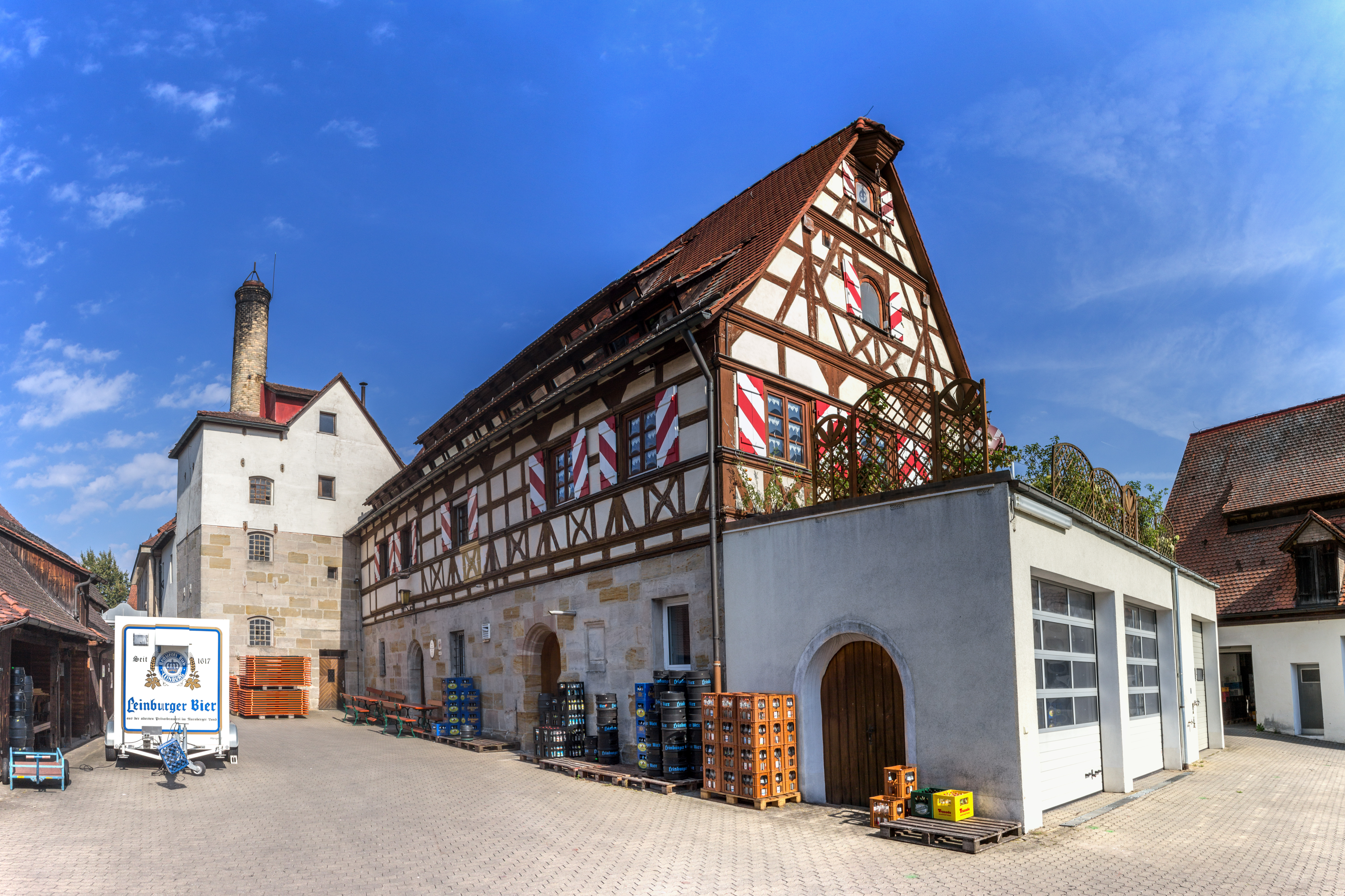 Gasthof in Leinburg, Marktplatz 14